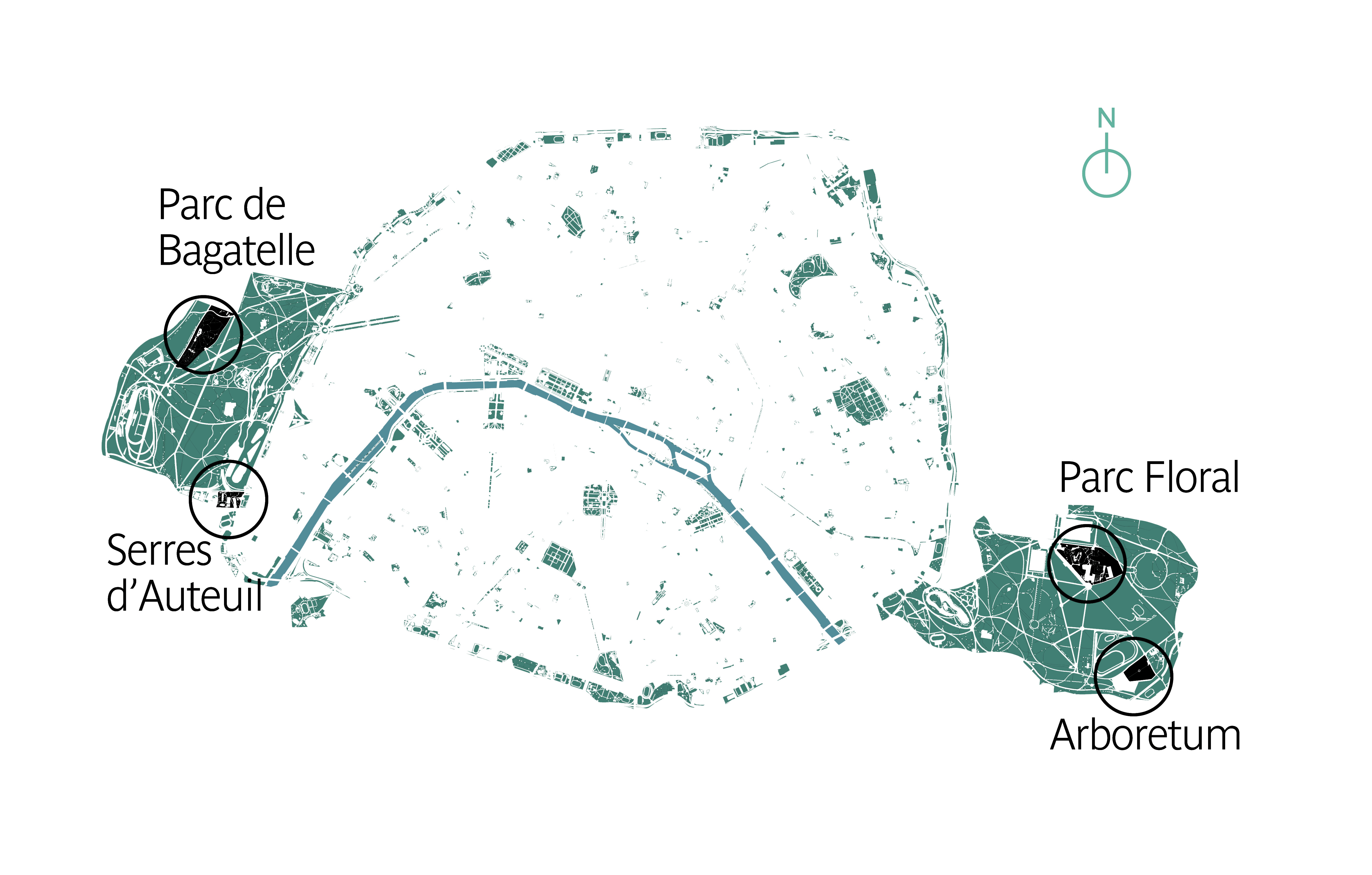 Plan de localisation des sites du Jardin Botanique de Paris